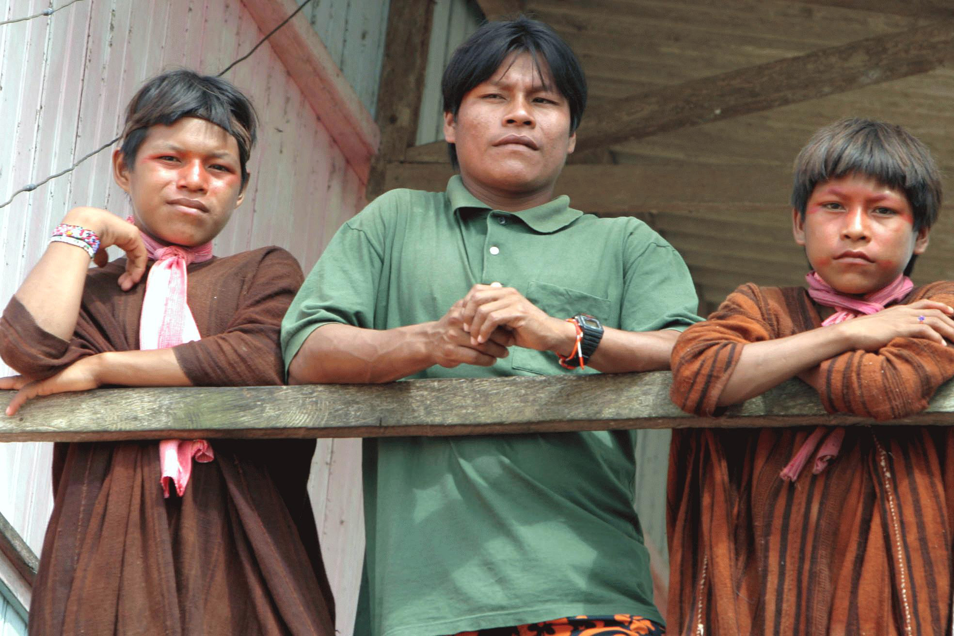 Acre - Índios brasileiros, da tribo Asháninka (Campas), que vivem no município de Marechal Taumaturgo.